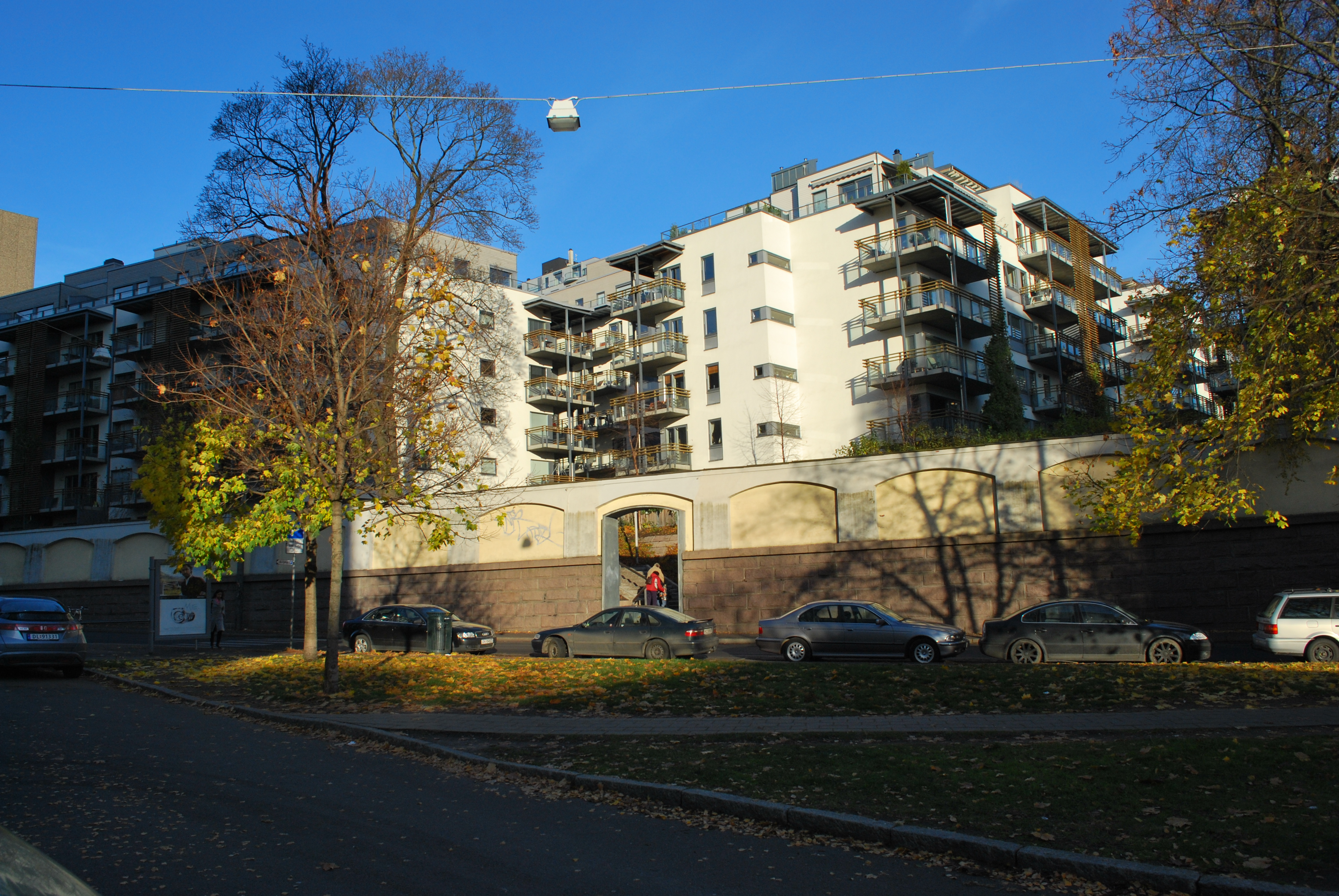 Pilestredet park bak smittemuren langs Pilestredet, Oslo